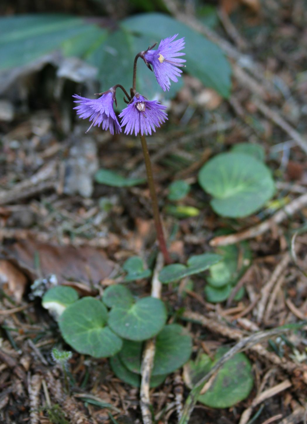 Alpen-Soldanelle (Soldanella alpina), Primelgewächse (Primulaceae) - Österreich/Austria/Autriche: Steiermark, Ennstaler Alpen, Admonter Höhe SW St. Gallen, ca. 1300 m